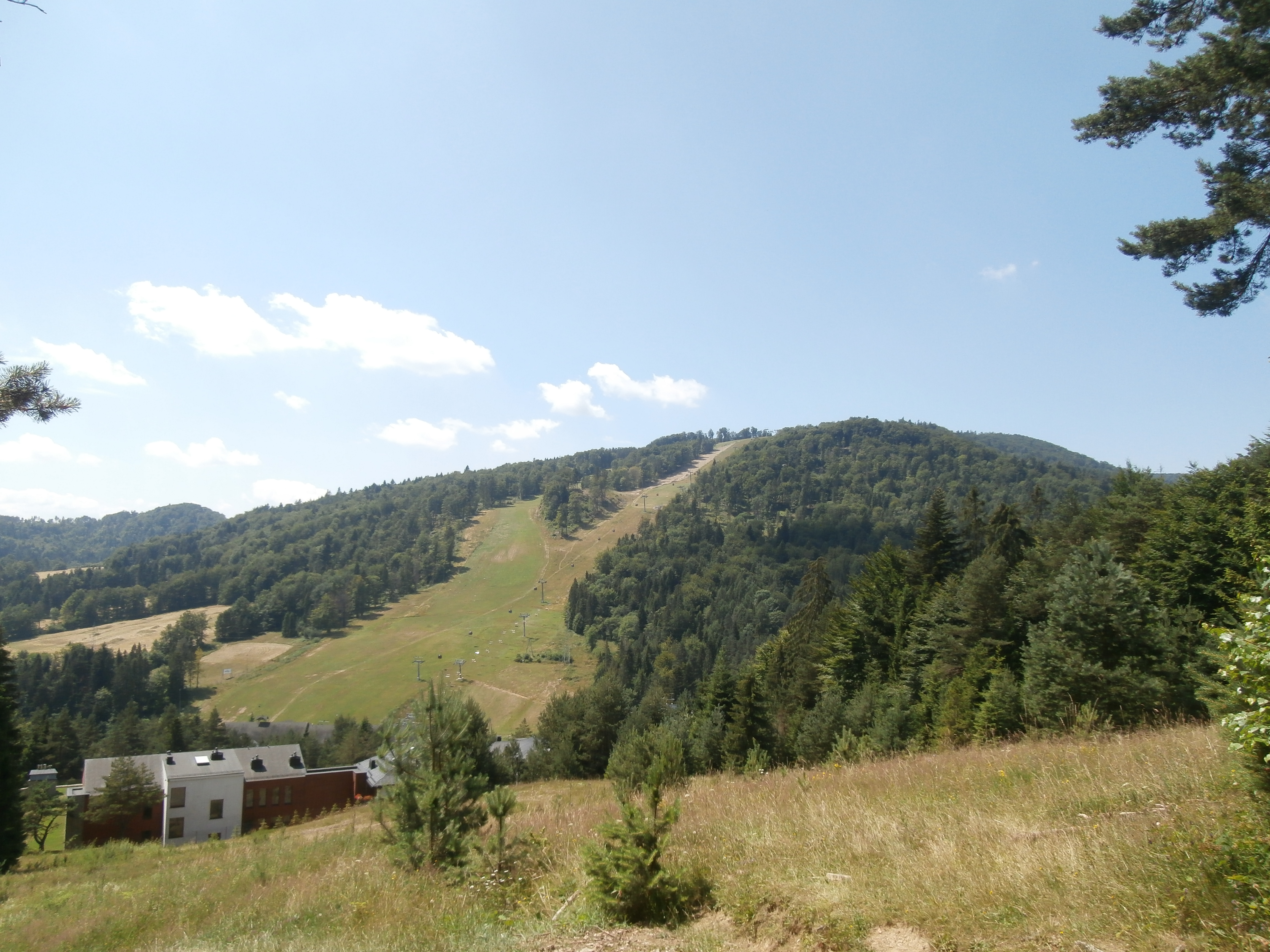 Jaworzyna Krynicka - widok z Krzyżowej. Krynica, Czarny Potok.